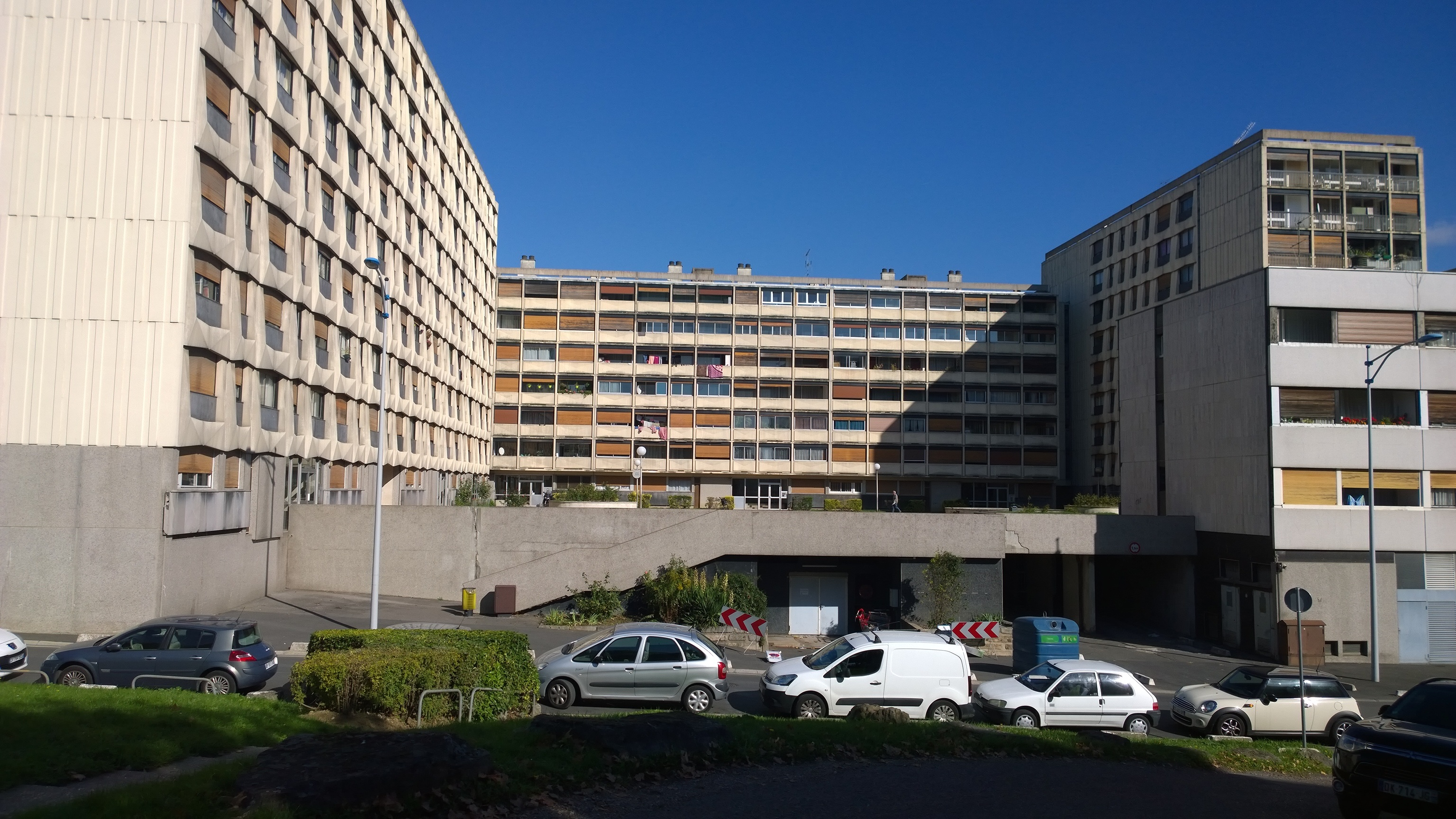 95200 Sarcelles, France